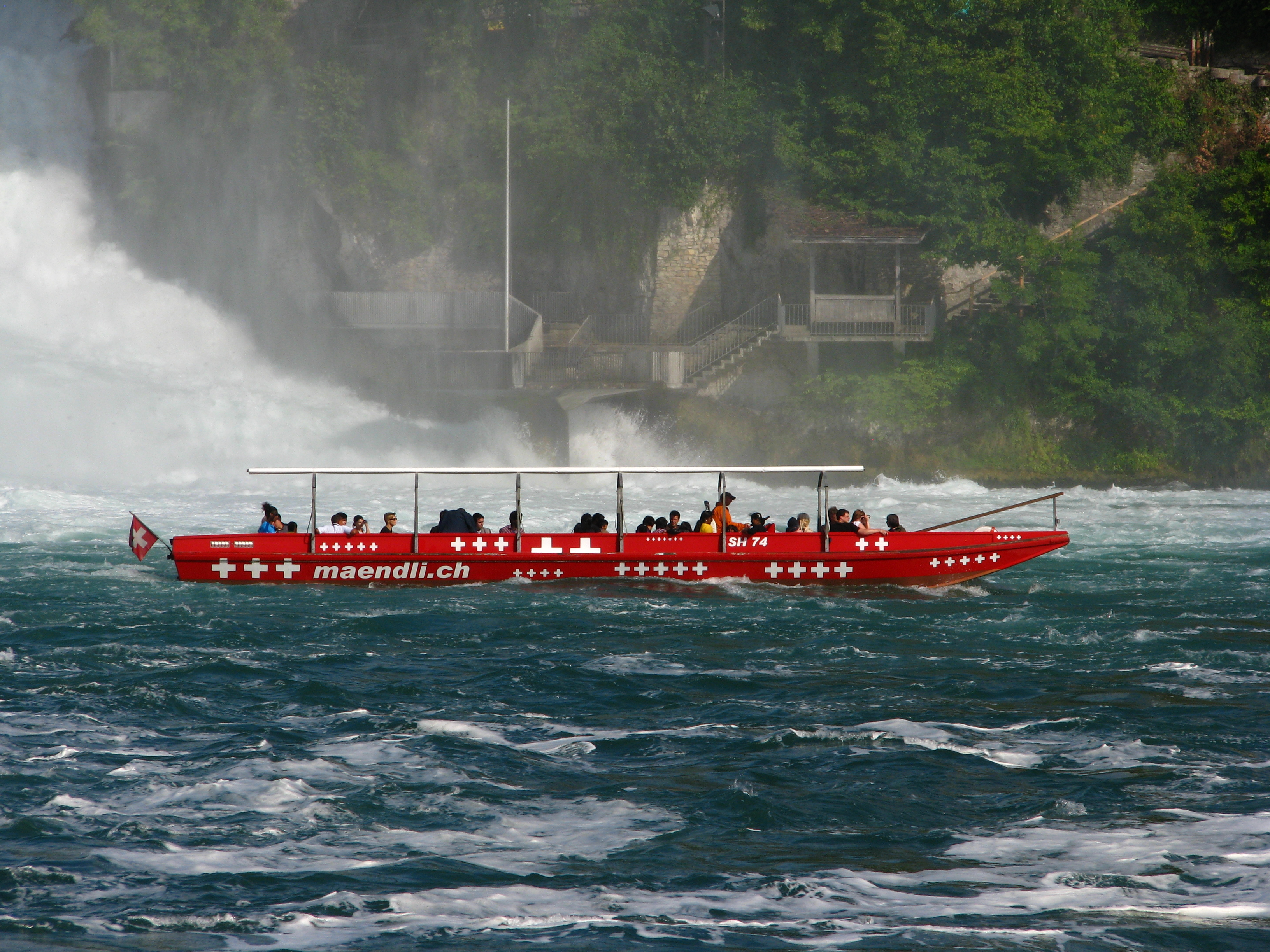 Touristic boat at Rheinfall as seen from Neuhausen am Rheinfall (Switzerland)